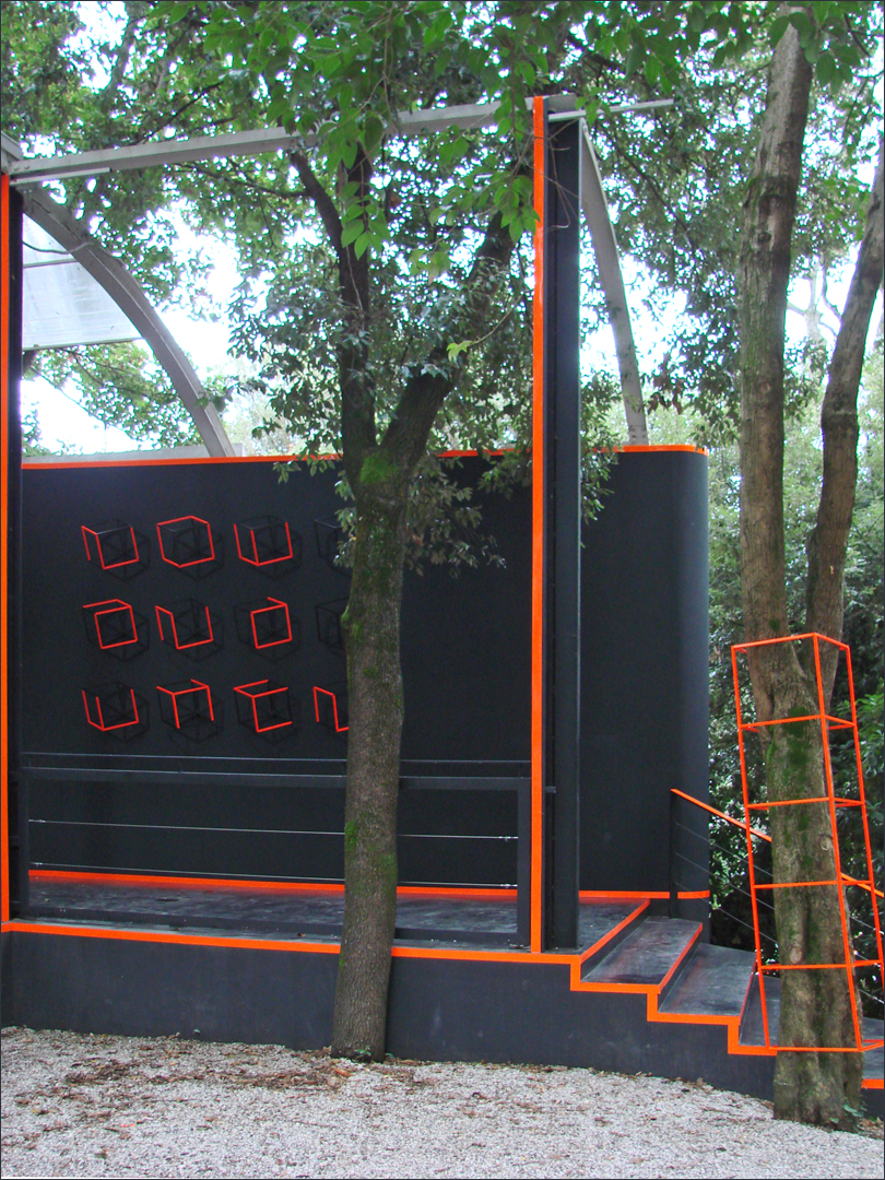 Le pavillon de l'Australie Mostra Internazionale di Architettura Exposition internationale d'architecture Venezia / Venise "People meet in architecture" du 29/08 au 21/11/2010 le site de la Biennale